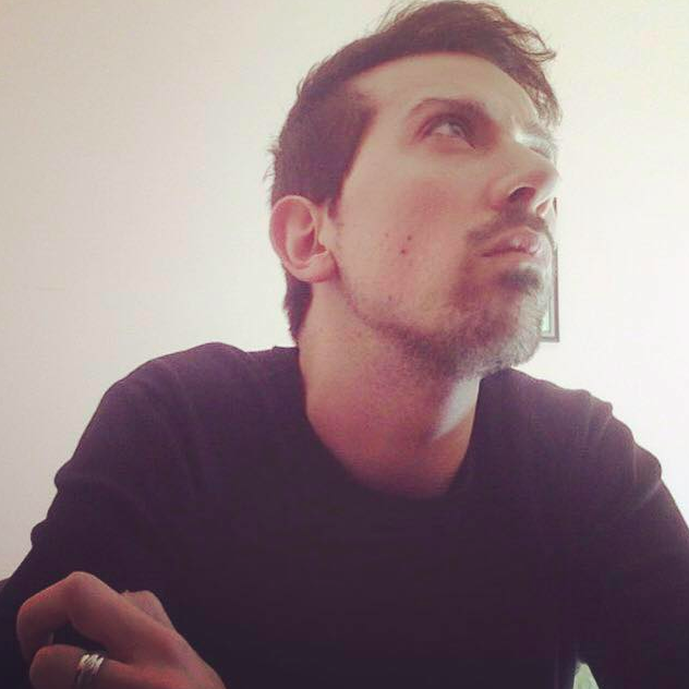 Foto dell'autore